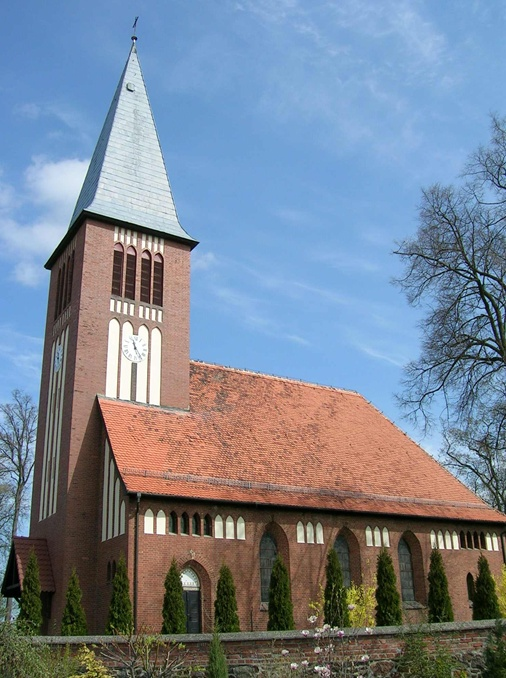 Kościół Nawiedzenia Najświętszej Maryi Panny w Polanowicach